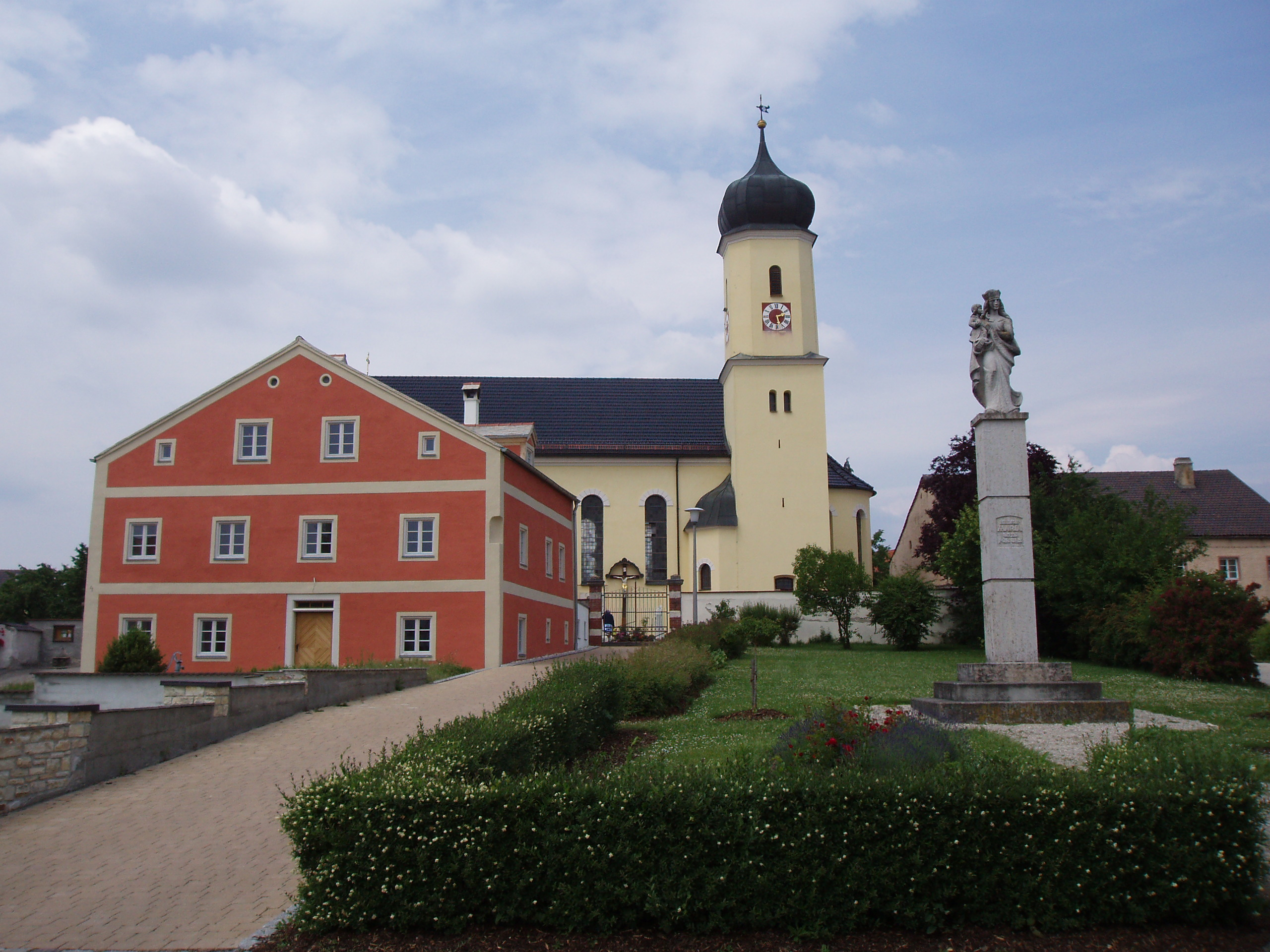 Hofstetten im Landkreis Eichstätt, Areal um die Pfarrkirche This is a photograph of an architectural monument. This is a photograph of an architectural monument.